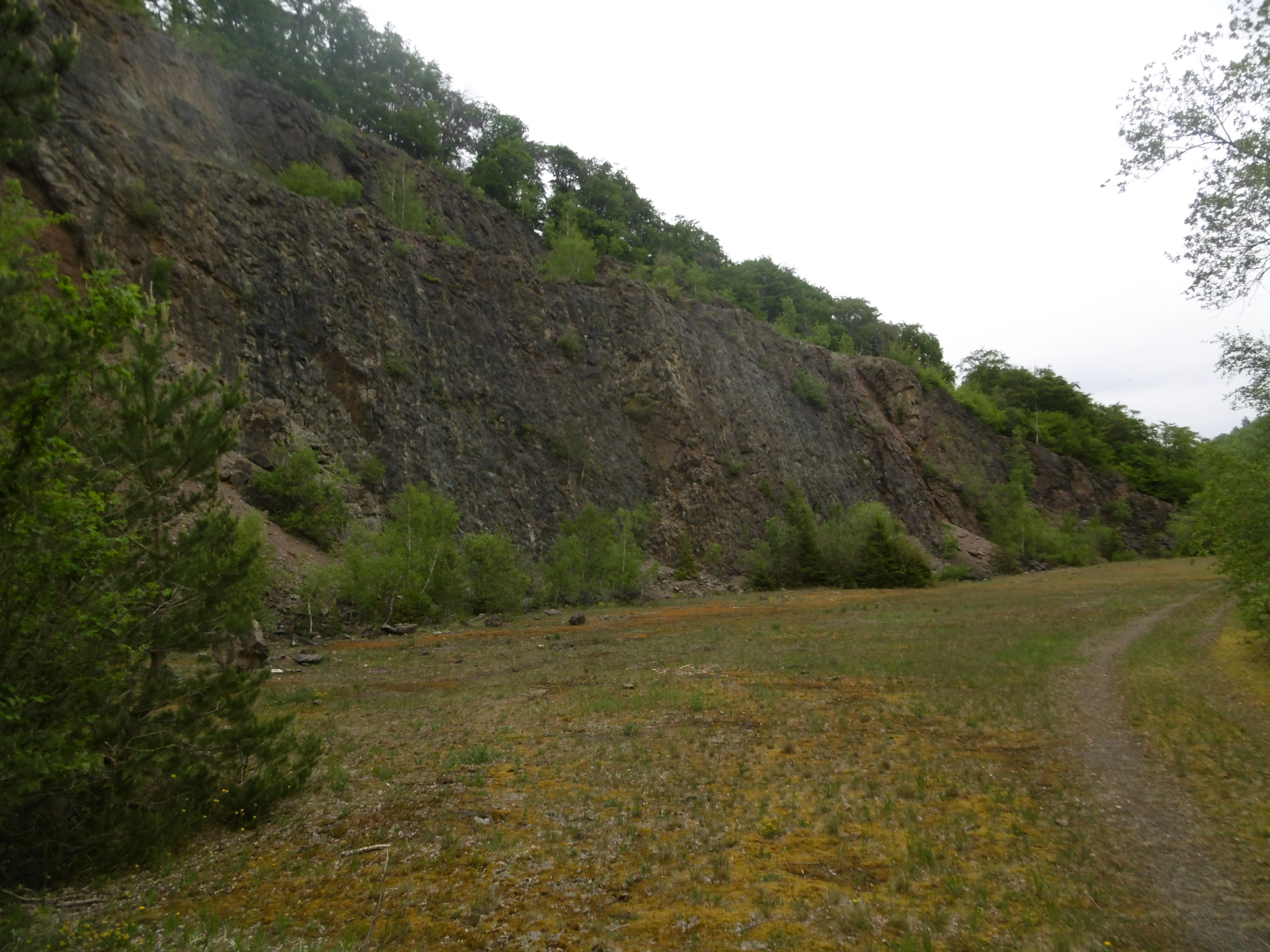 Naturschutzgebiet Südlicher Arnstein; Blick in Bruch von Westen.